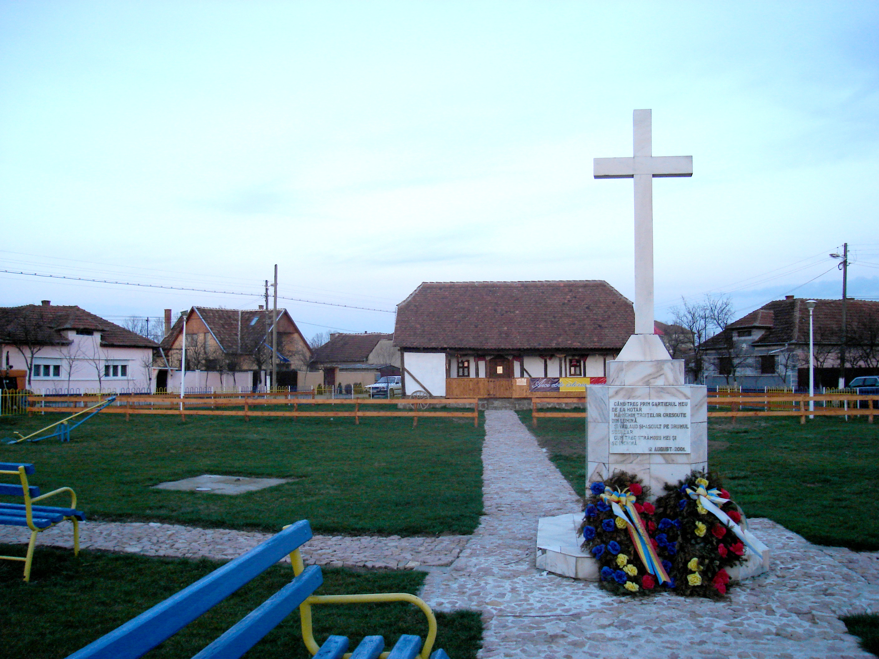 Muzeul ţăranului şi troiţa din Salonta, judeţul Bihor, România